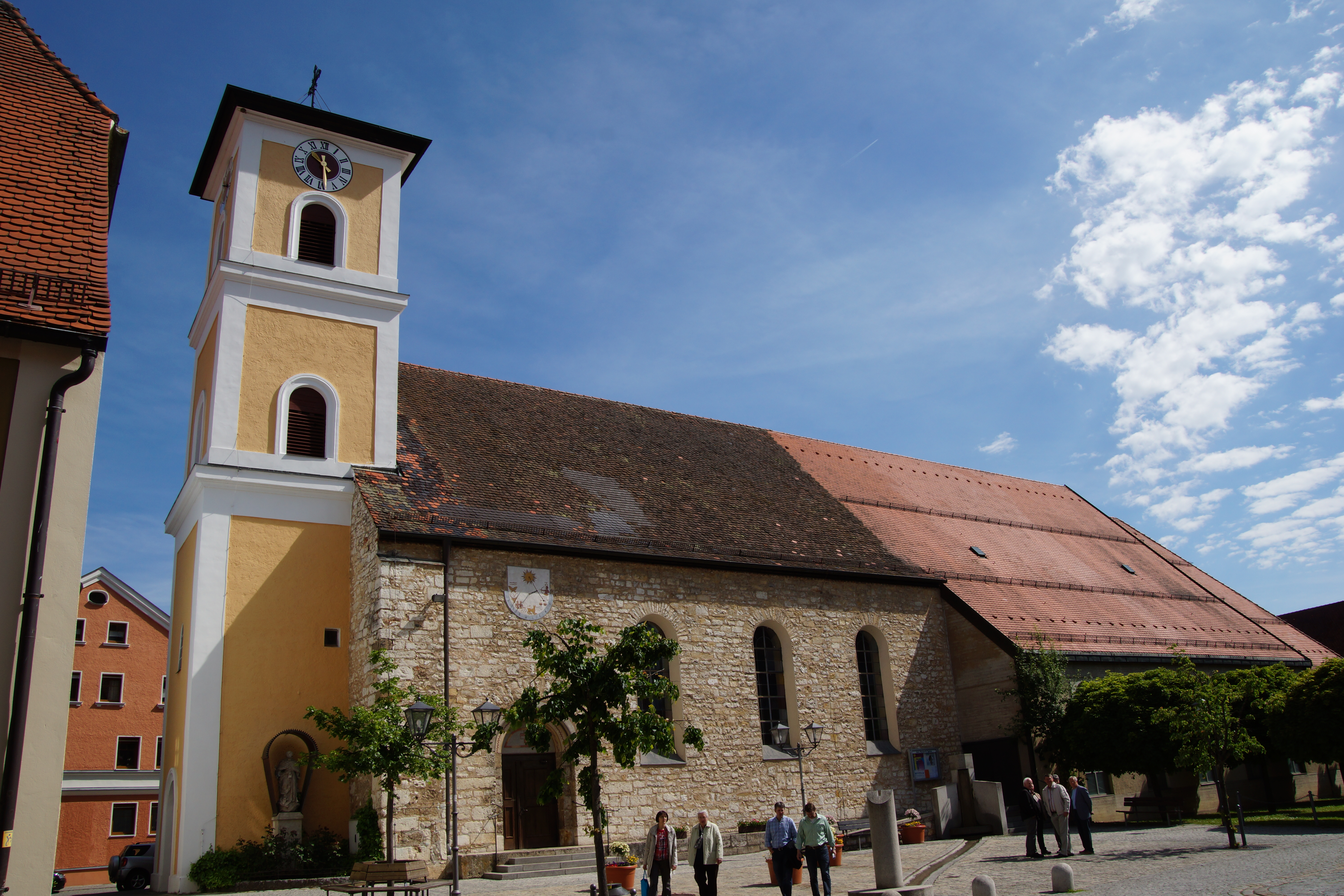 Die katholische Pfarrkirche St. Ägidius in Schmidmühlen in der Oberpfalz